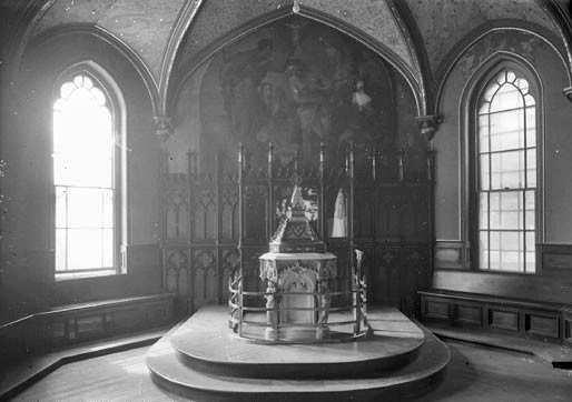 Le baptistère de l’église Notre-Dame photographié en 1929 par Edgar Gariépy